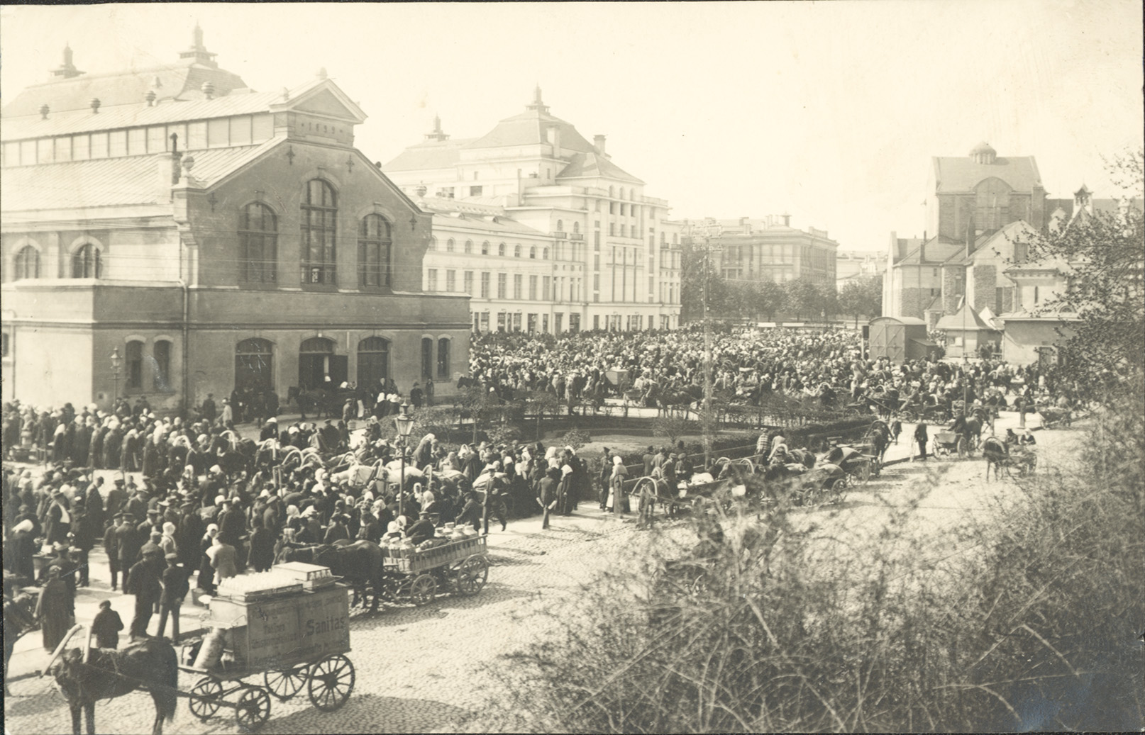 Vaade Tallinna turule: turuhoone, "Estonia" ja Saksa teater